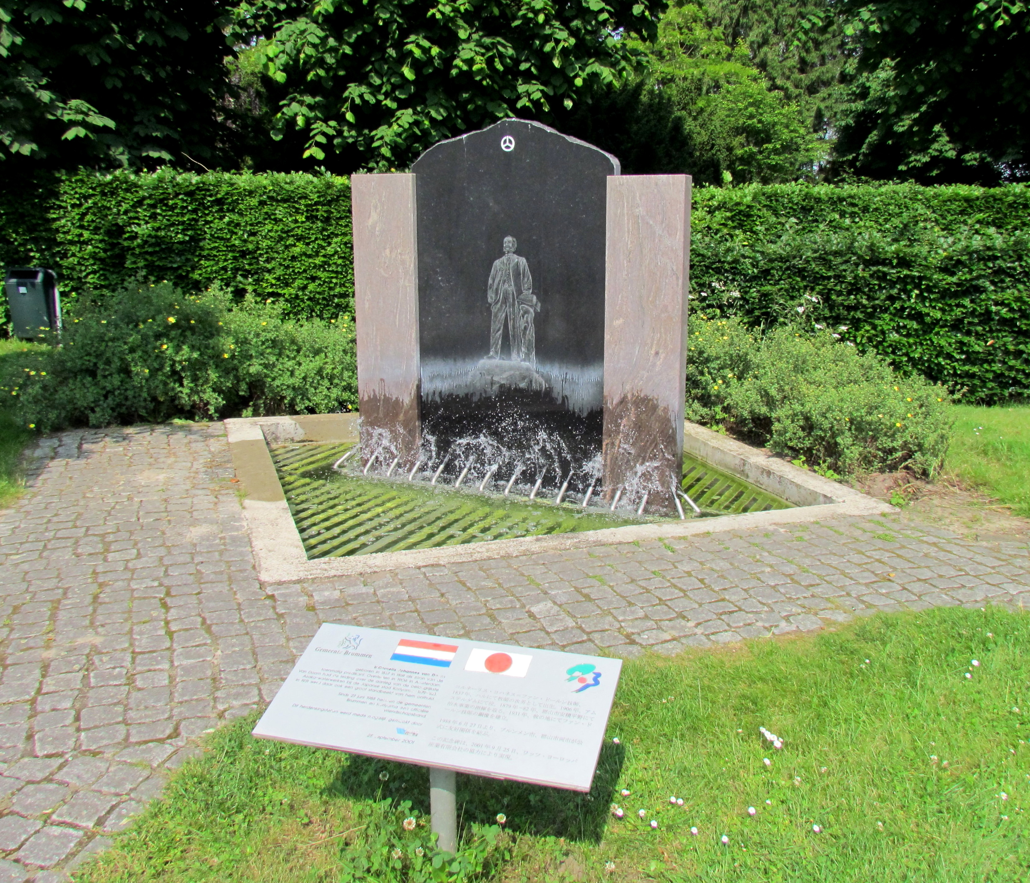 Monument voor Cornelis Johannes van Doorn in zijn geboorte plaats Hall, gemeente Brummen, NL. Zwartmarmeren plaat door J. Aartsen, 2001. Het betreft een afbeelding van het standbeeld van Van Doorn in de Japanse gemeente Koriyama. Op de voorgrond een informatiepaneel in het Nederlands en Japans